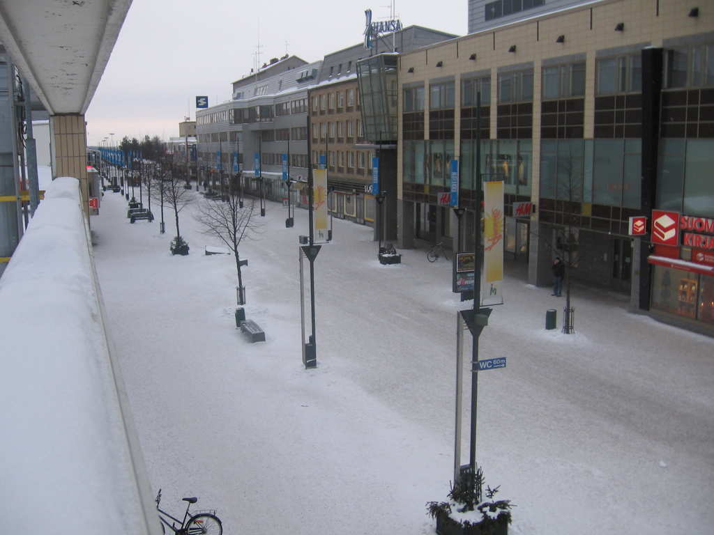 Kävelykatu Manski Kouvolassa maaliskuussa.